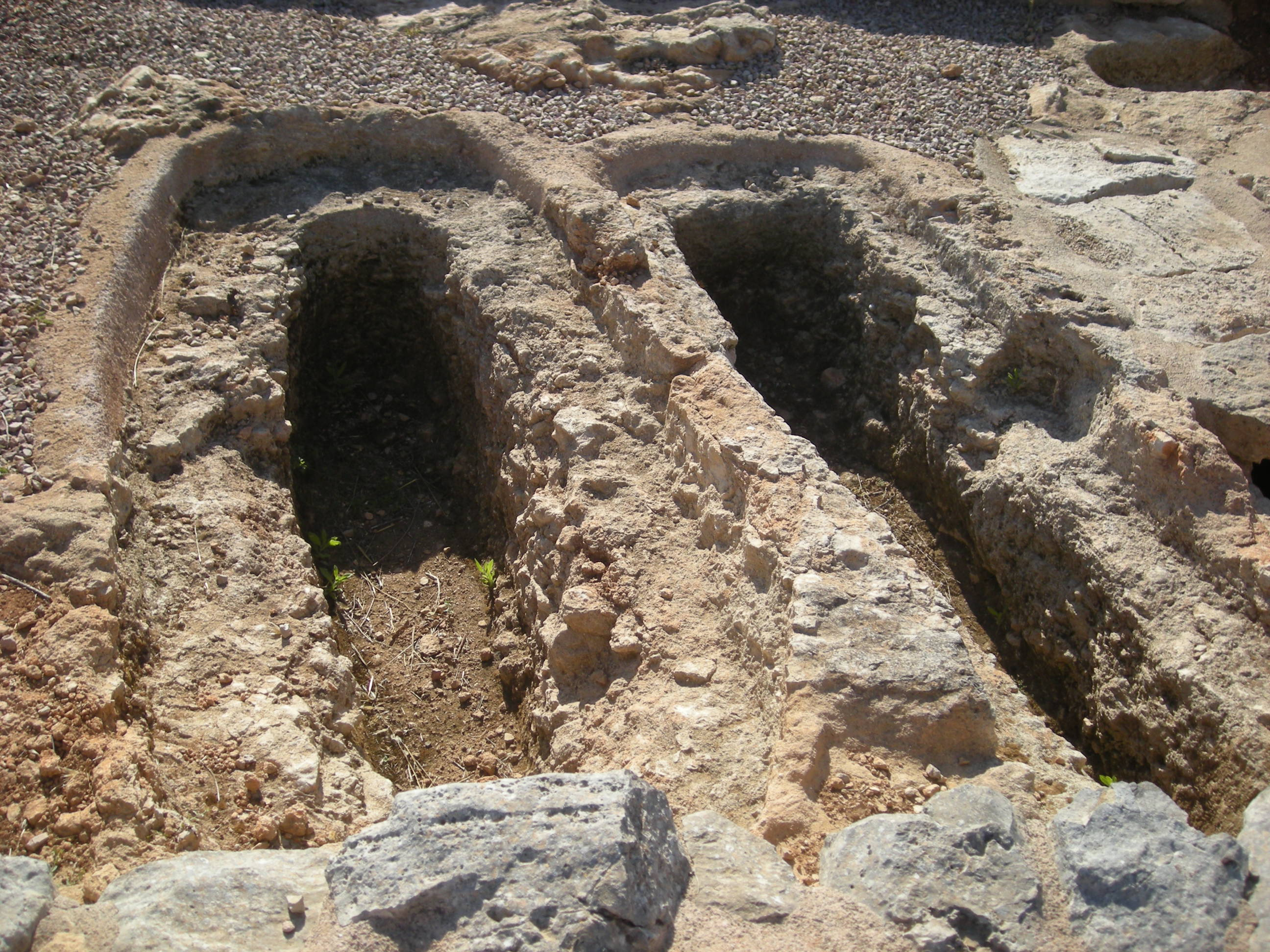 Basílica de Son Peretó. Manacor, Mallorca.